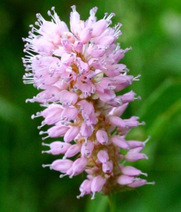 Polygonum bistorta